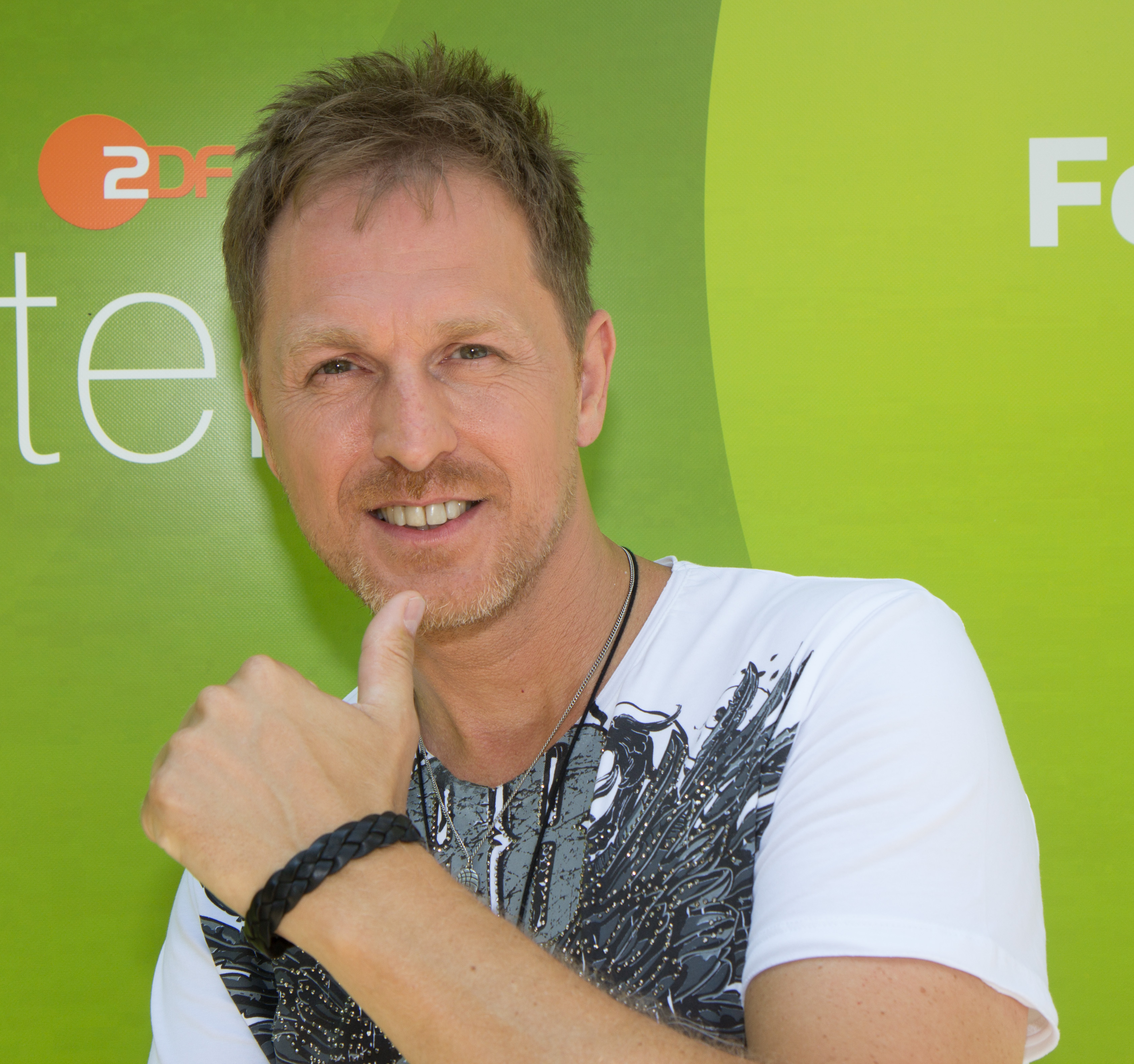 Jörg Bausch als Gast beim ZDF-Fernsehgarten am 10. Juni 2018 in Mainz.